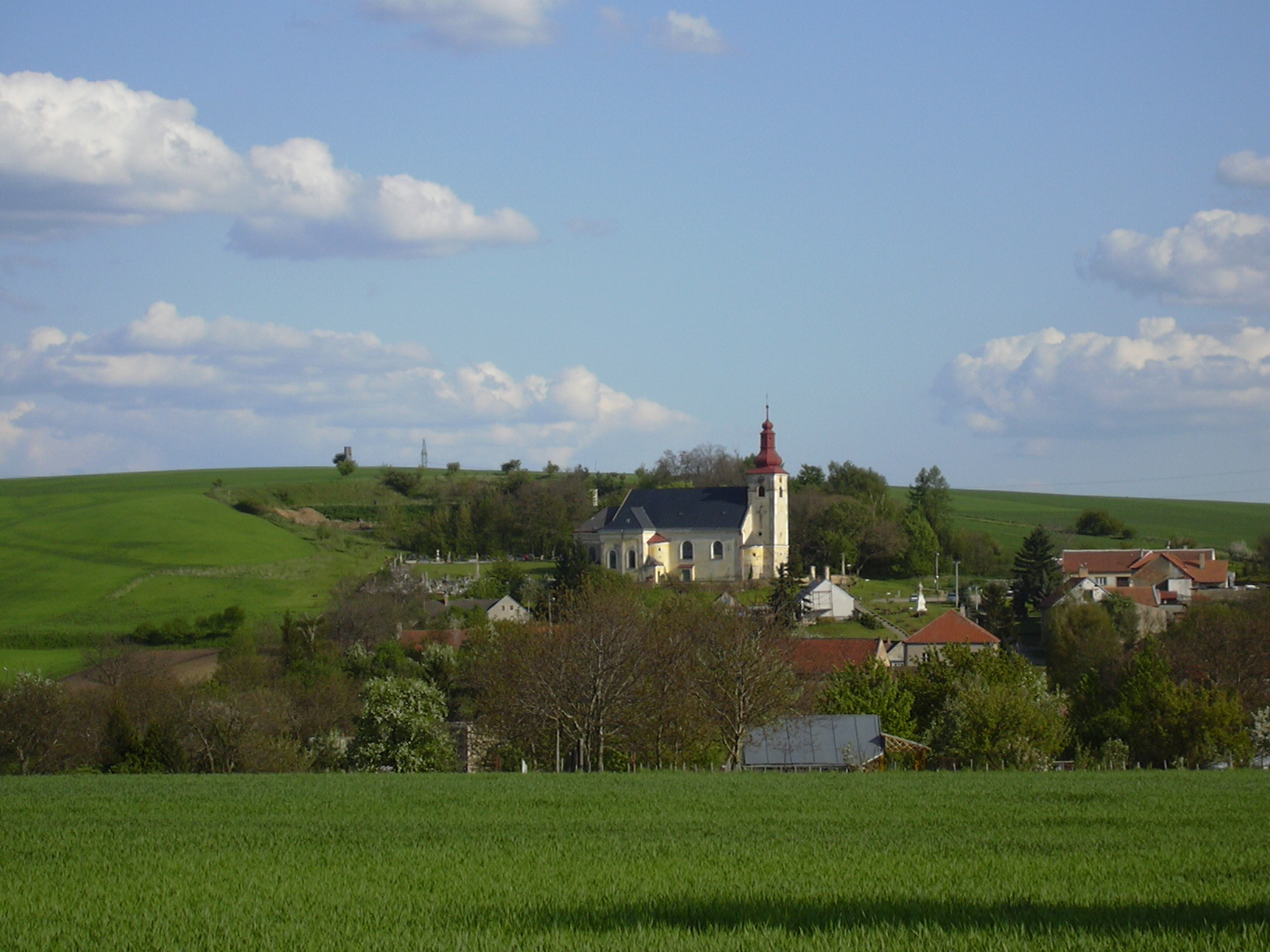 Celkový pohled na Kučerov (Vyškov District, Czech Republic)